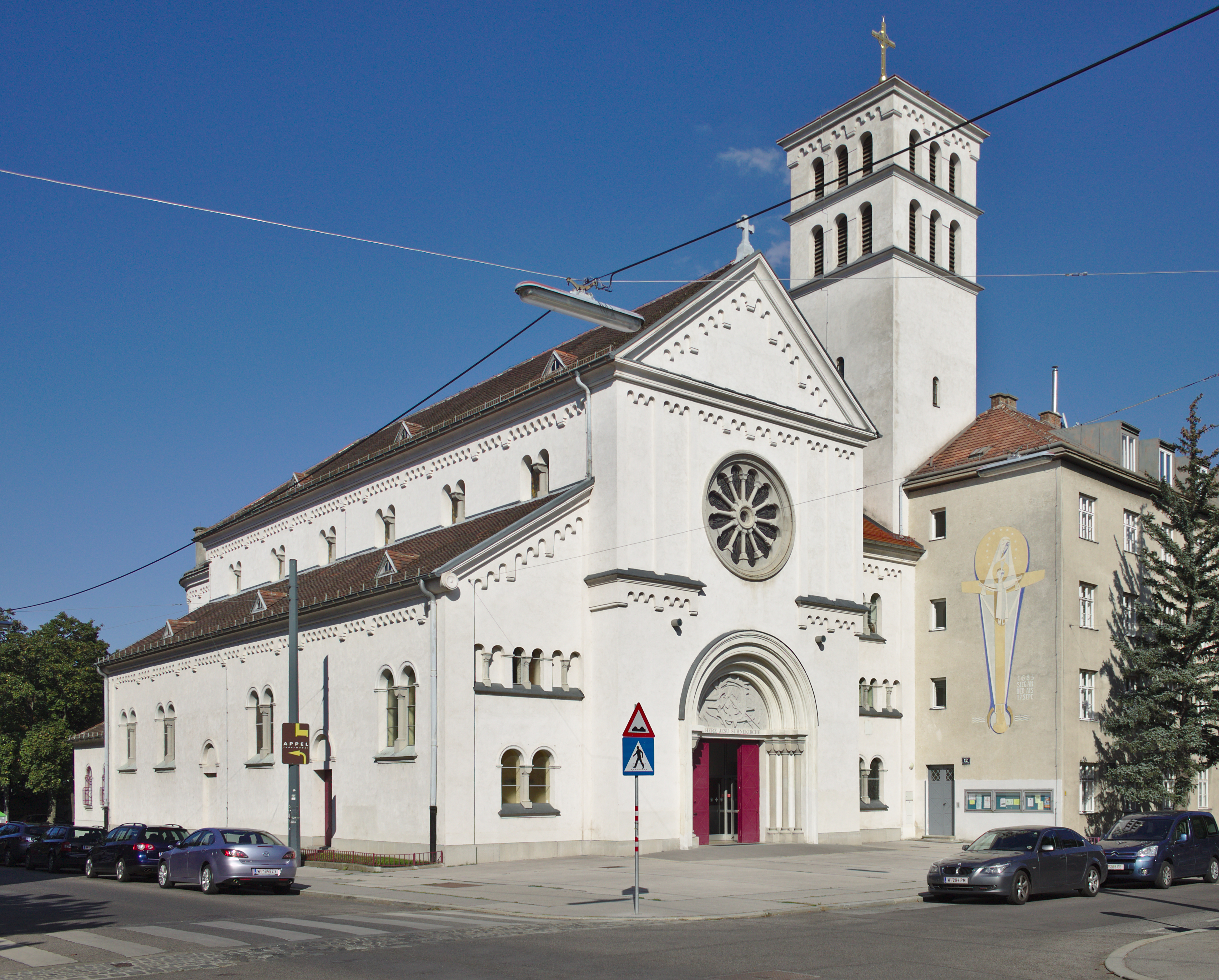 Kath. Pfarrkirche, Sühnekirche hl. Herz Jesu